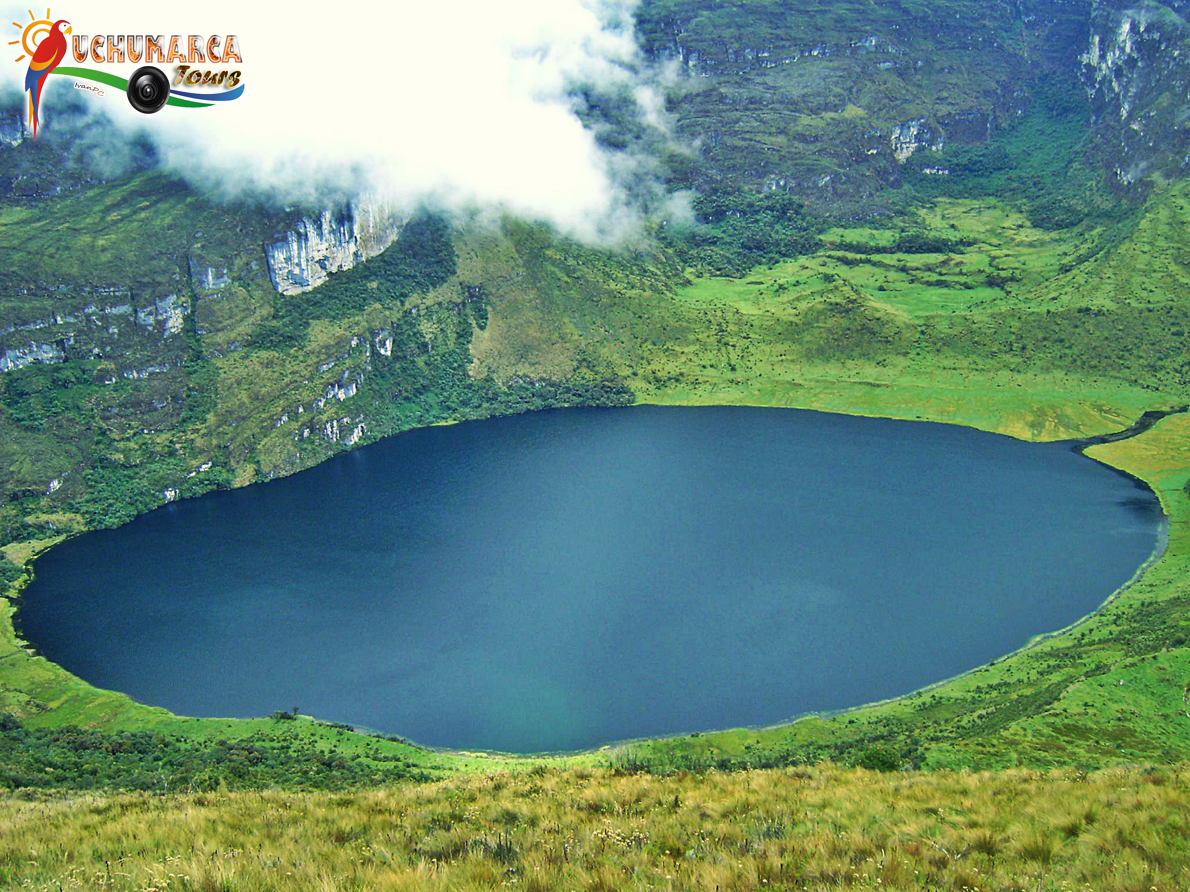 Ubicado en Perú - La Libertad